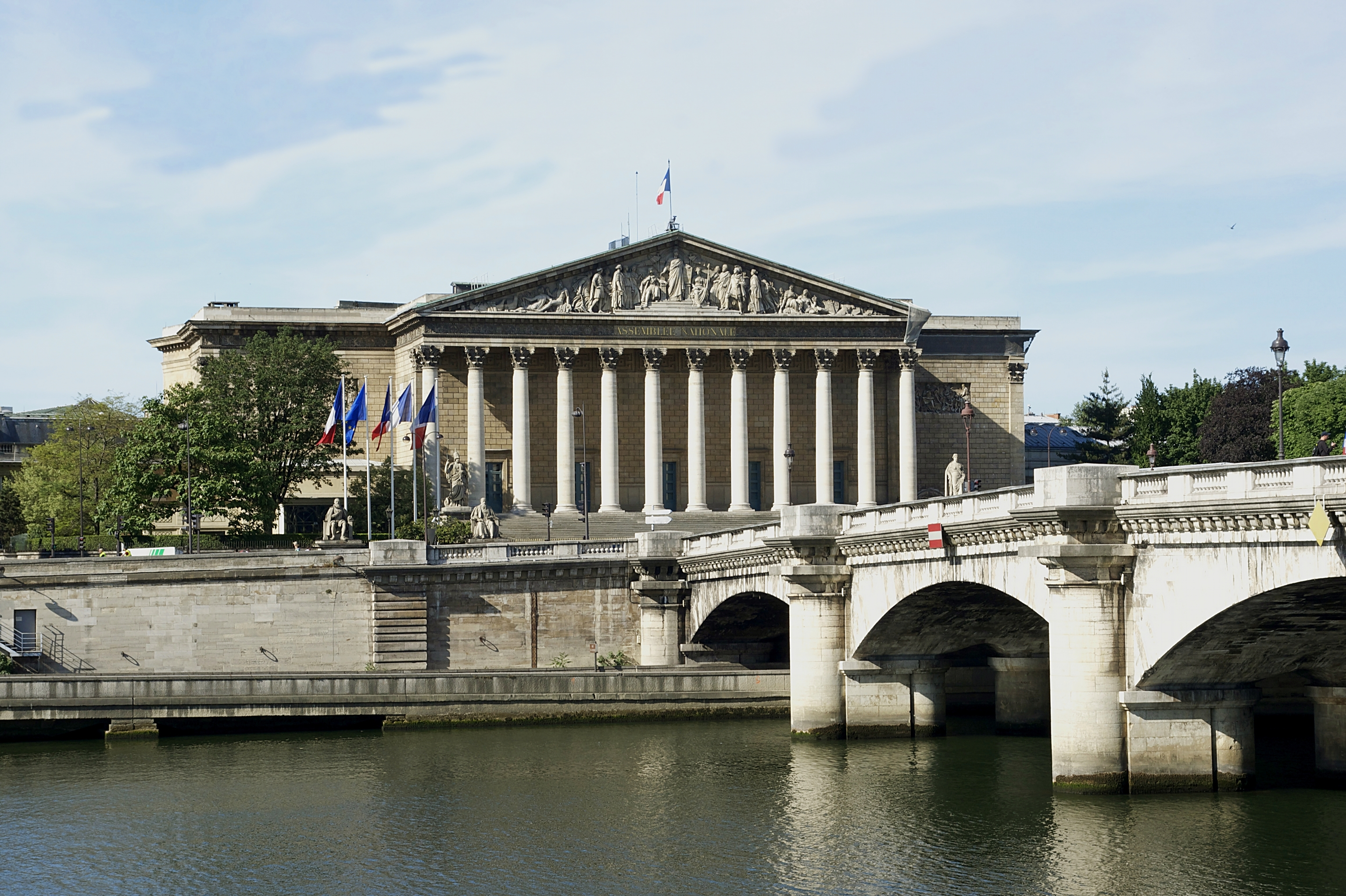 L'Assemblée Nationale, le Pont de la Concorde, depuis le quai des Tuileries.